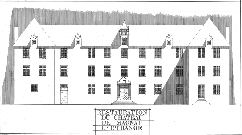 Dessin de 1970 de la façade du château de Magnat